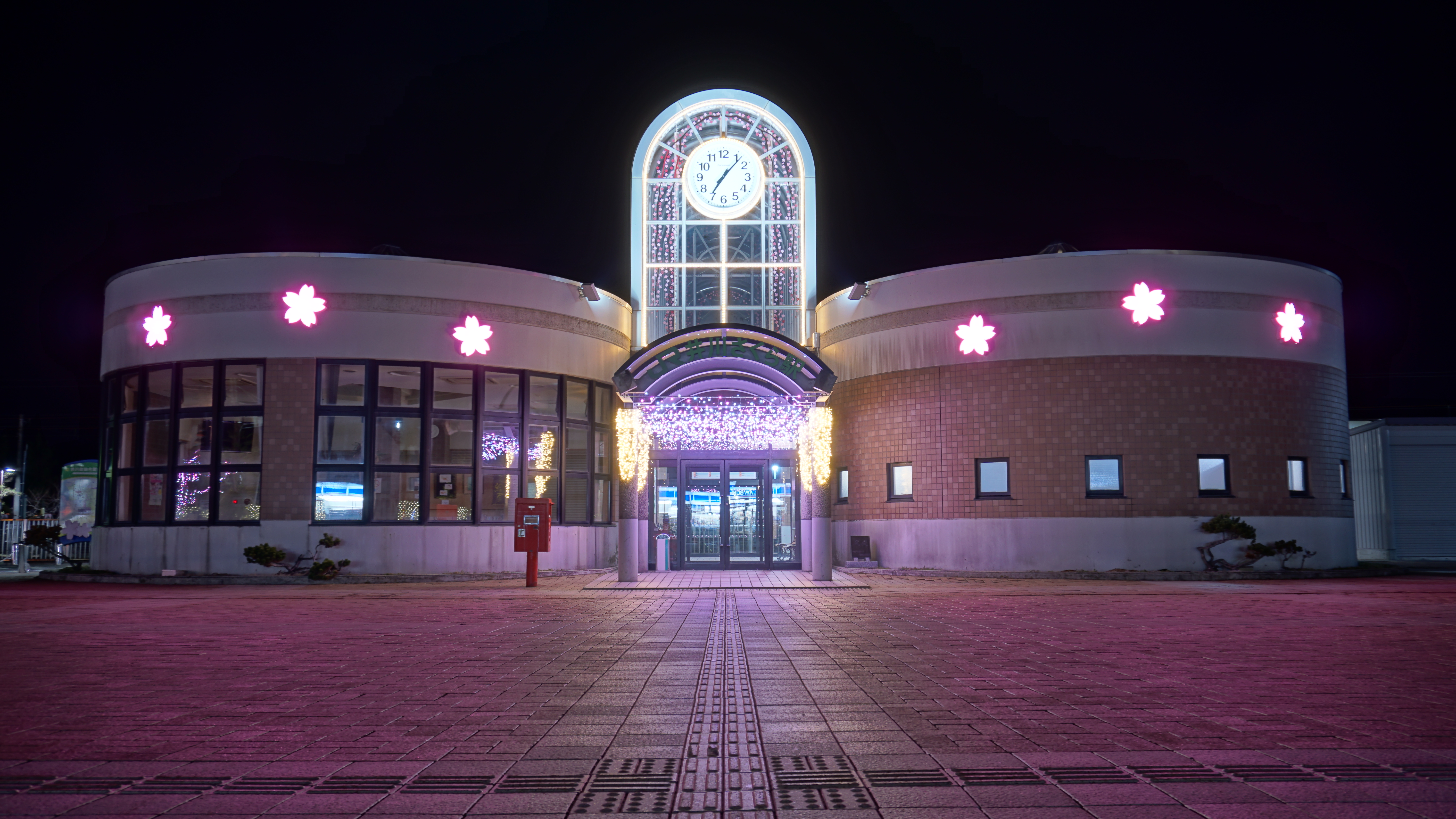 ライトアップされた奥羽本線・井川さくら駅（秋田県南秋田郡井川町） Sony ILCE-6300